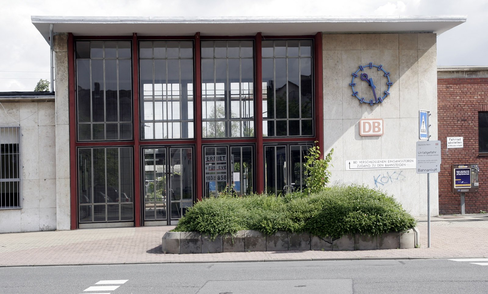 Groß-Gerau Trainstation Der Bahnhof der Stadt Groß-Gerau